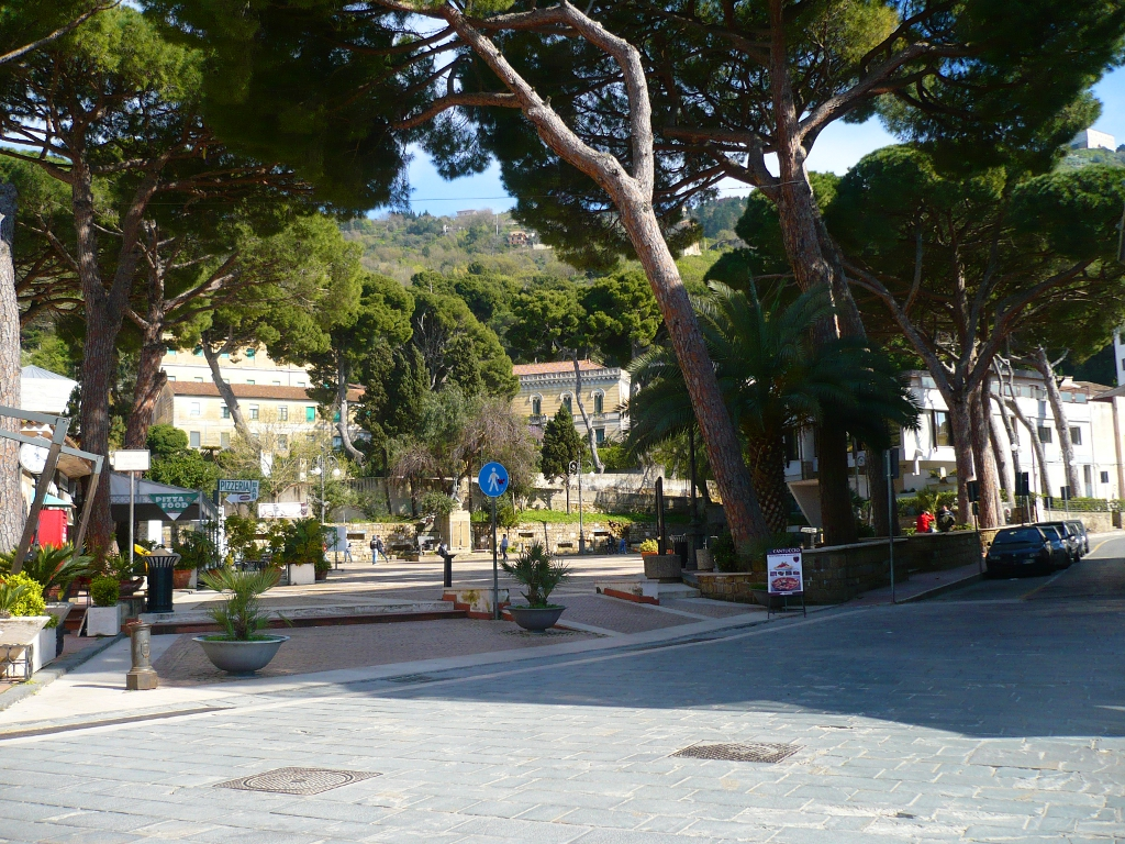 Piazza Lucia a Santa Maria di Castellabate, la sede del comune di Castellabate